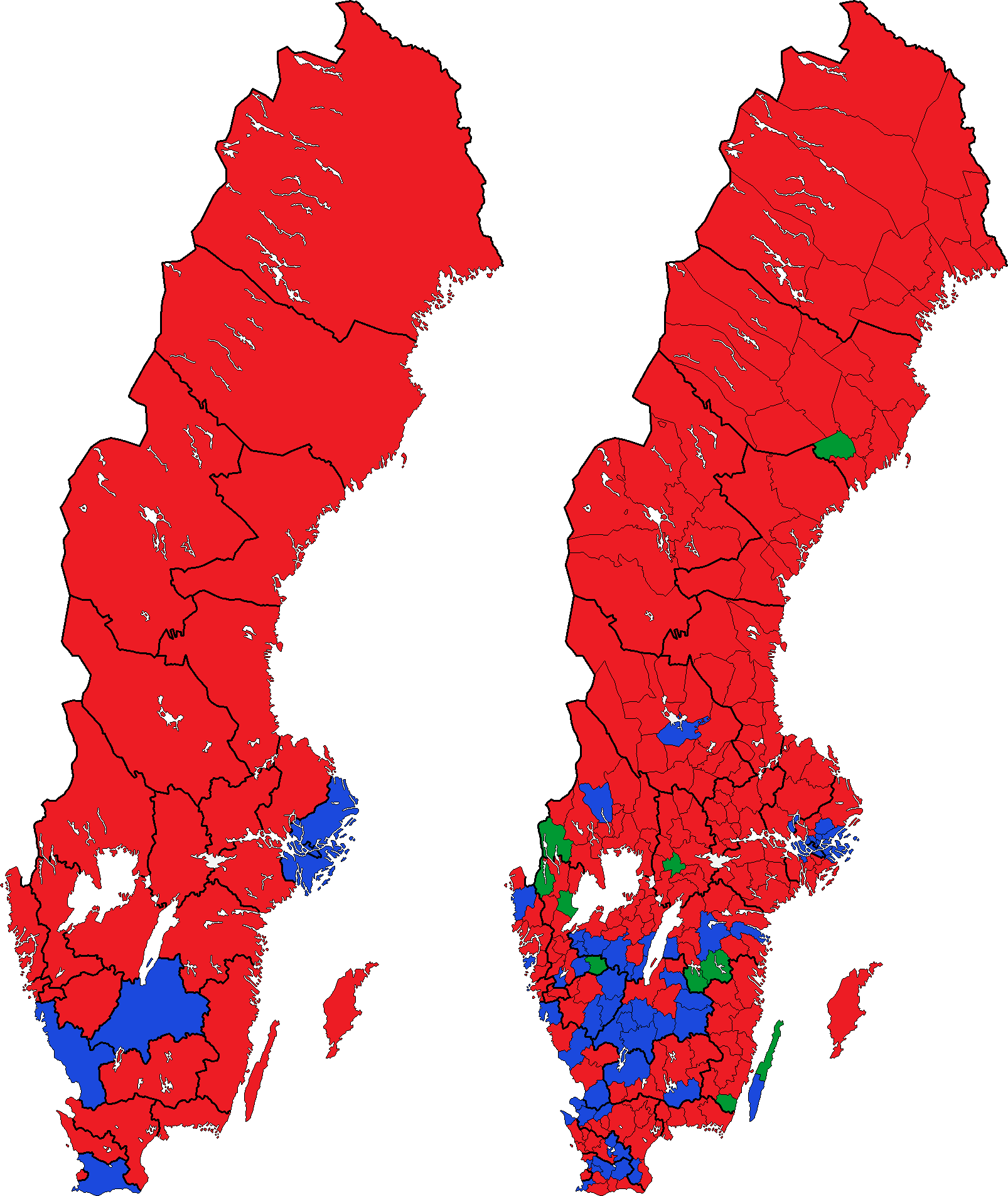 Största parti inom det ledande blocket i samtliga valkretsar och kommuner i riksdagsvalet 1994. Moderata samlingspartiet, Folkpartiet liberalerna, Centerpartiet och Kristdemokraterna har räknats till det borgerliga blocket medan Arbetarpartiet-Socialdemokraterna och Vänsterpartiet har räknats till det socialistiska blocket. Partier därutöver räknas som egna block. Socialdemokraterna Moderaterna Centerpartiet